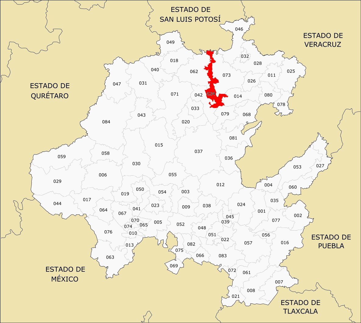 Municipios de Hidalgo